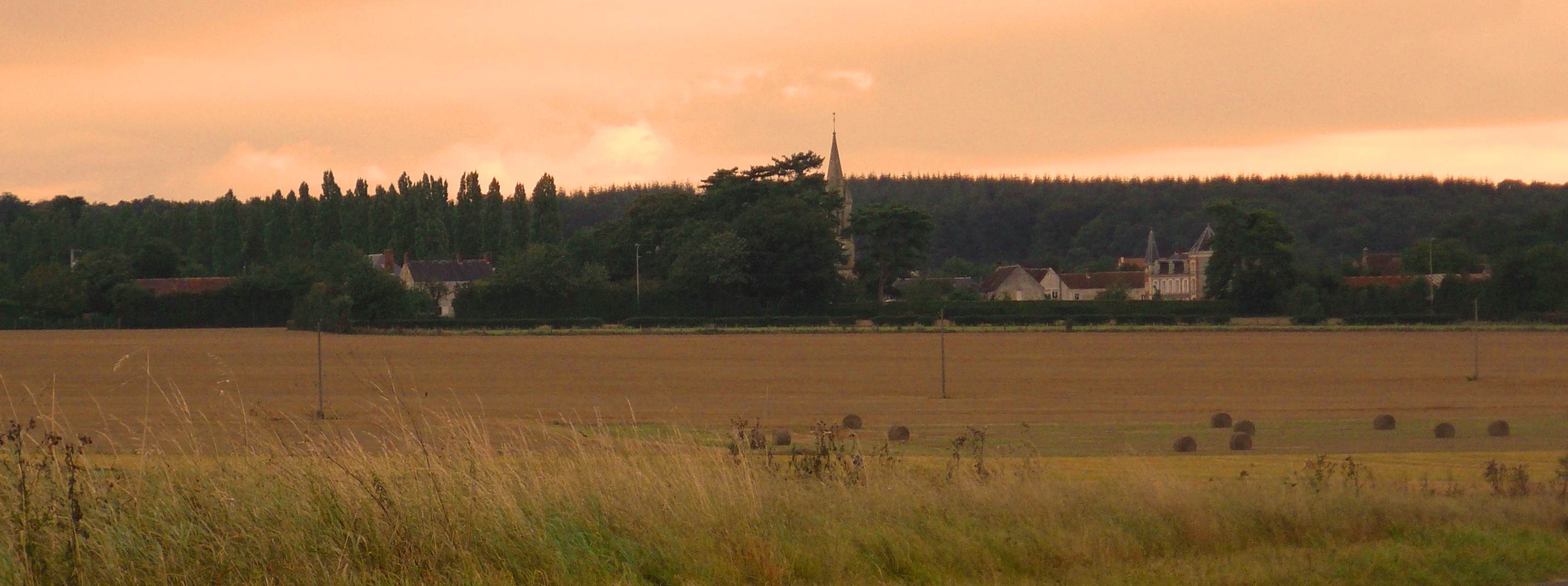 Vrigny